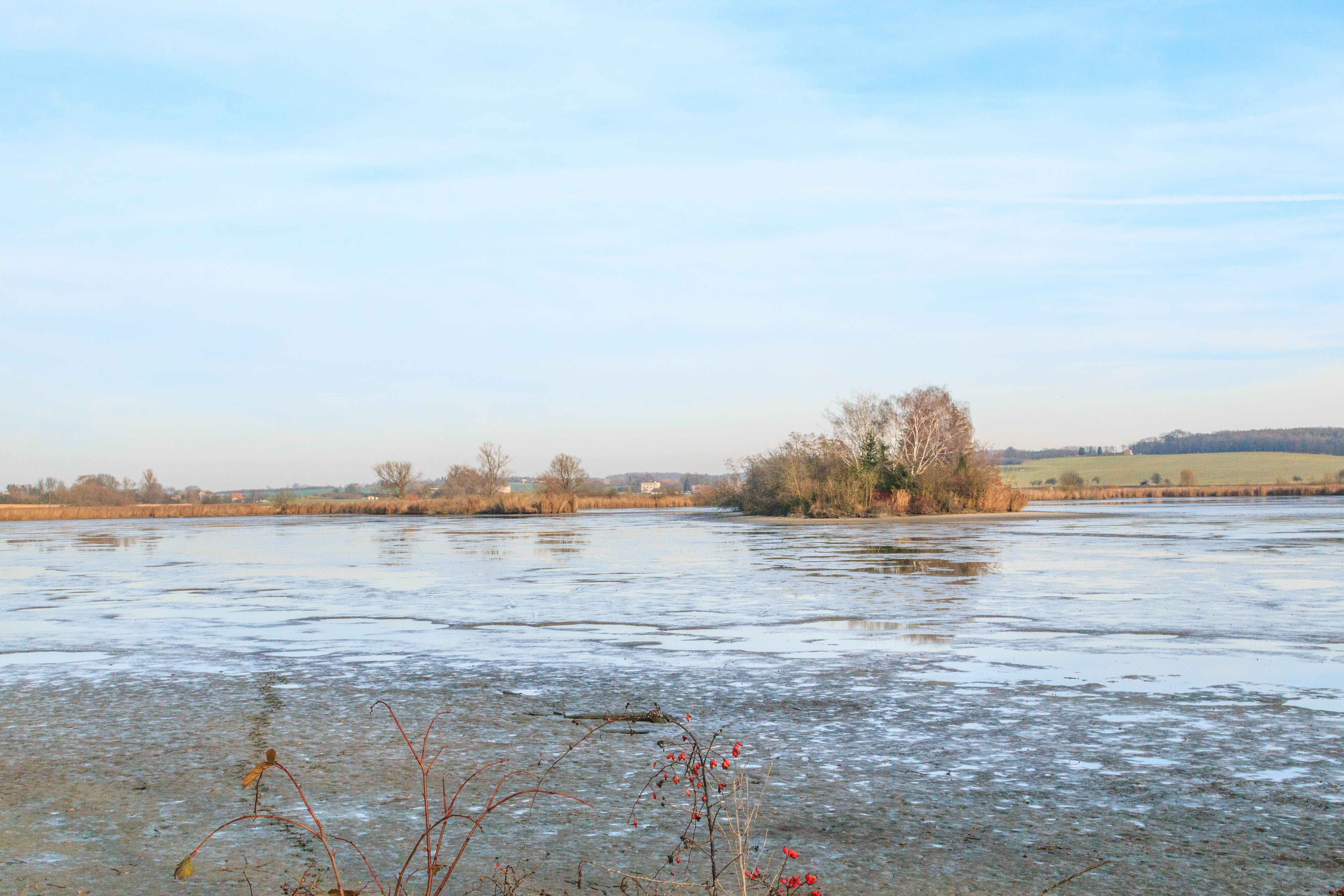 Strašovský rybník Project: Vodstvo.